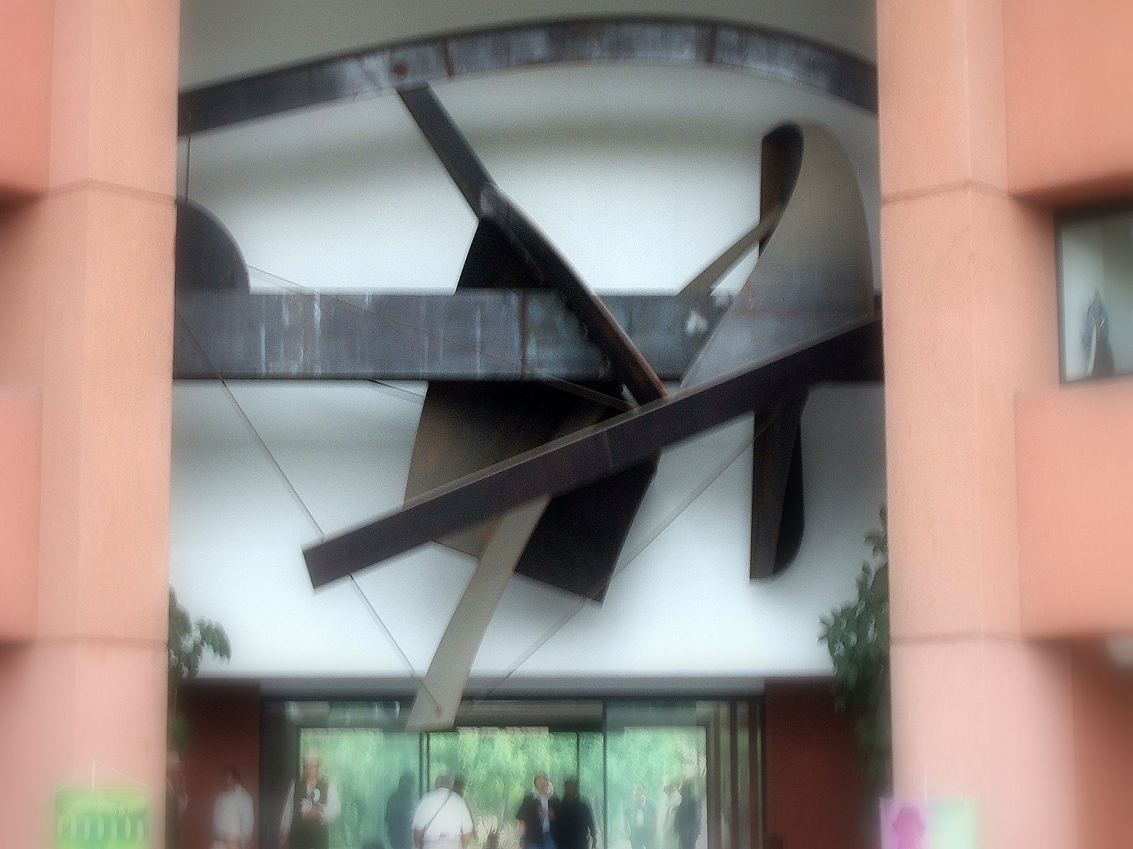 PUERTA DEL TIEMPO-Manuel Felguerez. Escultura en la Rectoria General de la UAM